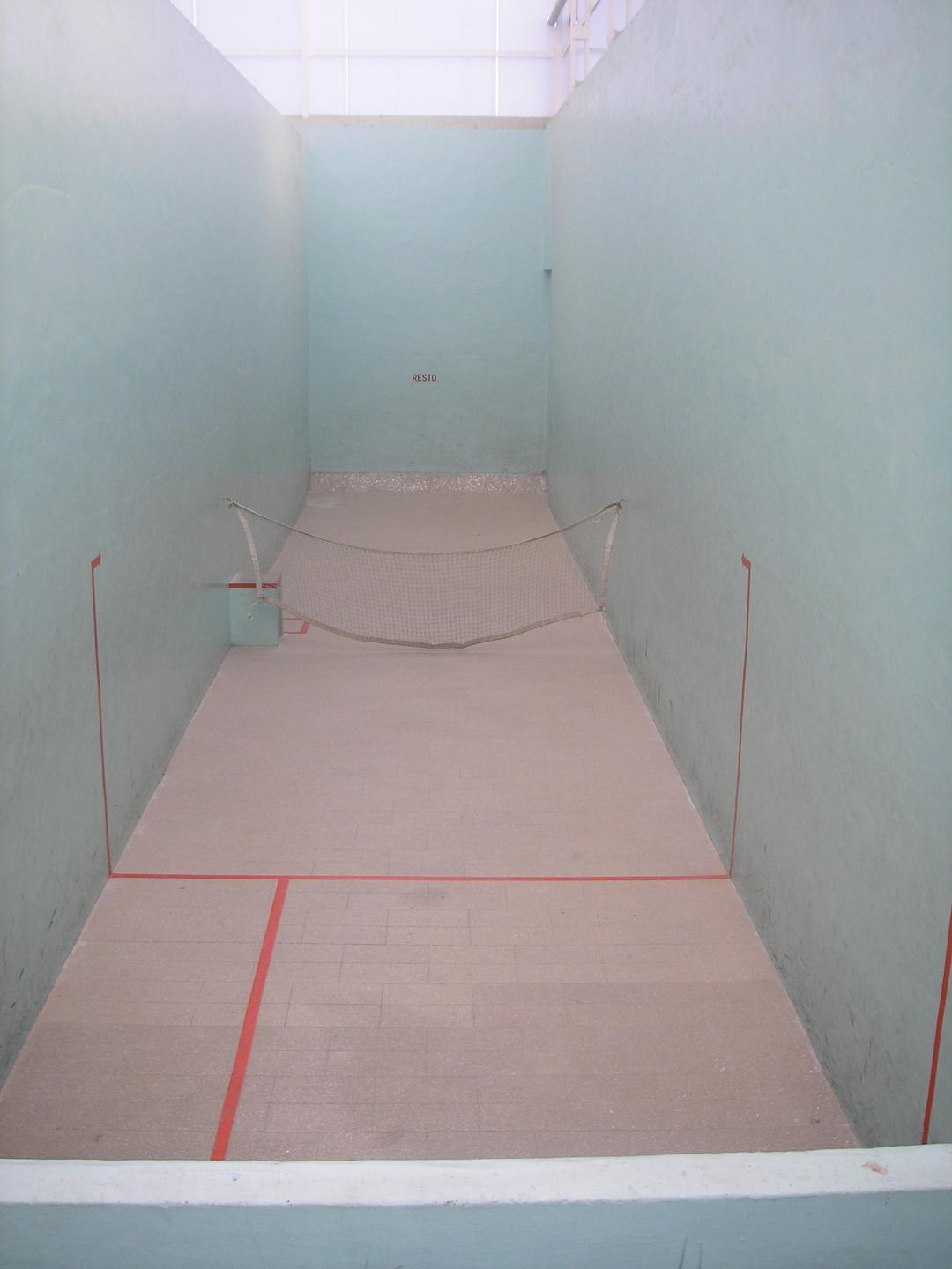 Vista general de una galotxeta de Monóvar